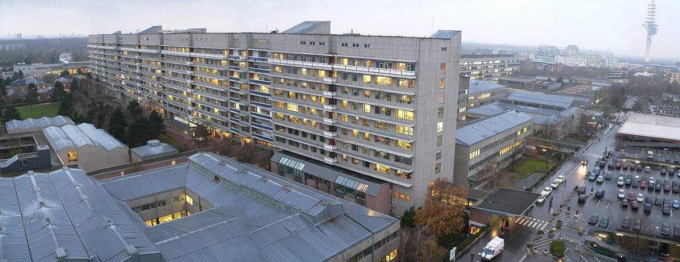 Bettenhaus der MHH